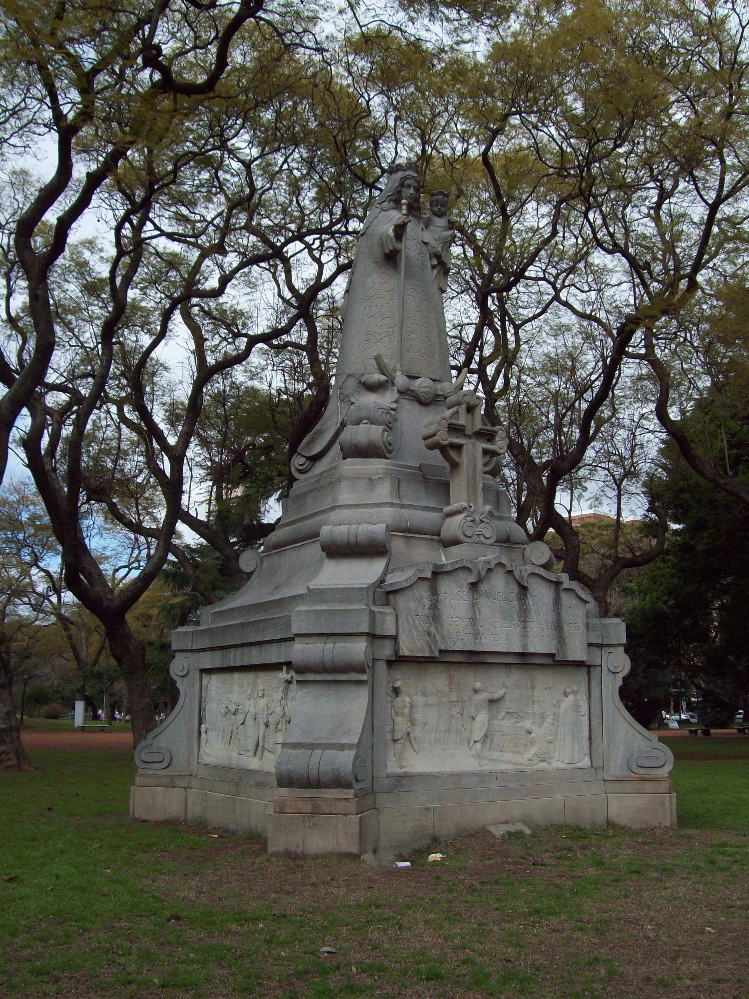 Nuestra Señora del Carmen de Cuyo, en Plaza Chile Buenos Aires.